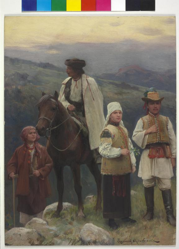 Почтівка. Буковинські гуцули.